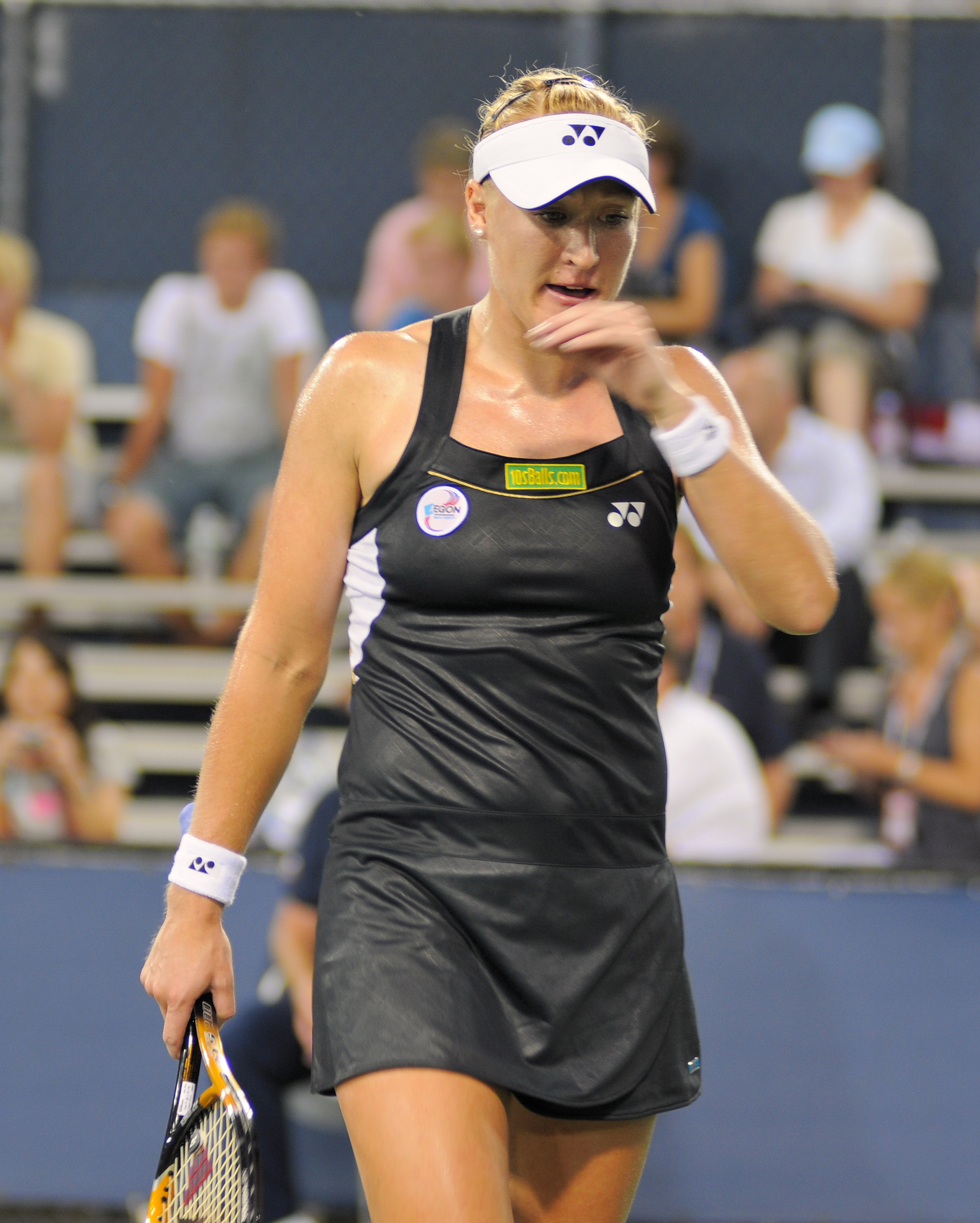 Elena Baltacha in US Open 2010